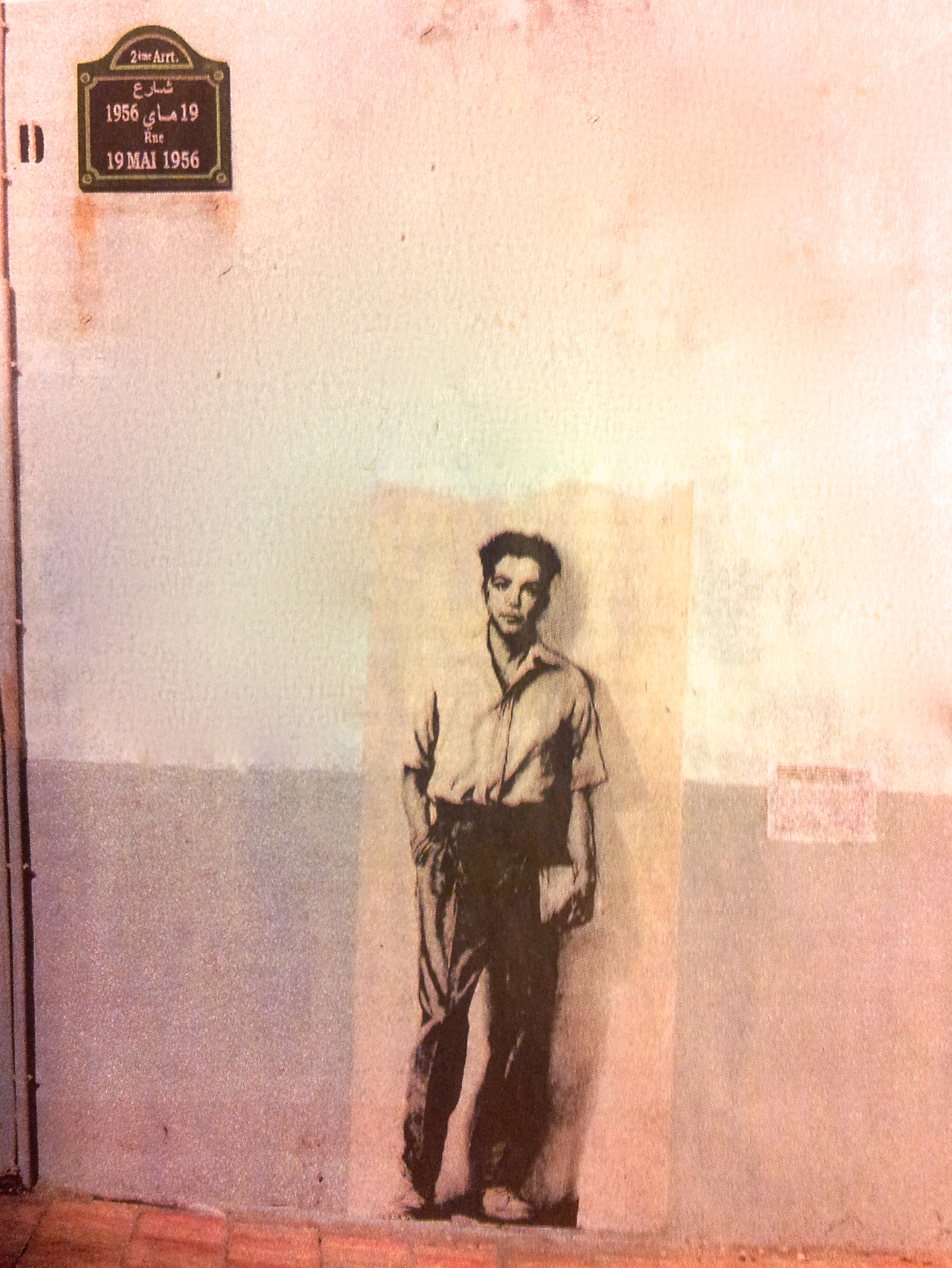 Portrait de Maurice Audin (1932 195?) peint sur le mur, rue 19 mai 1956 à Alger (Algérie)